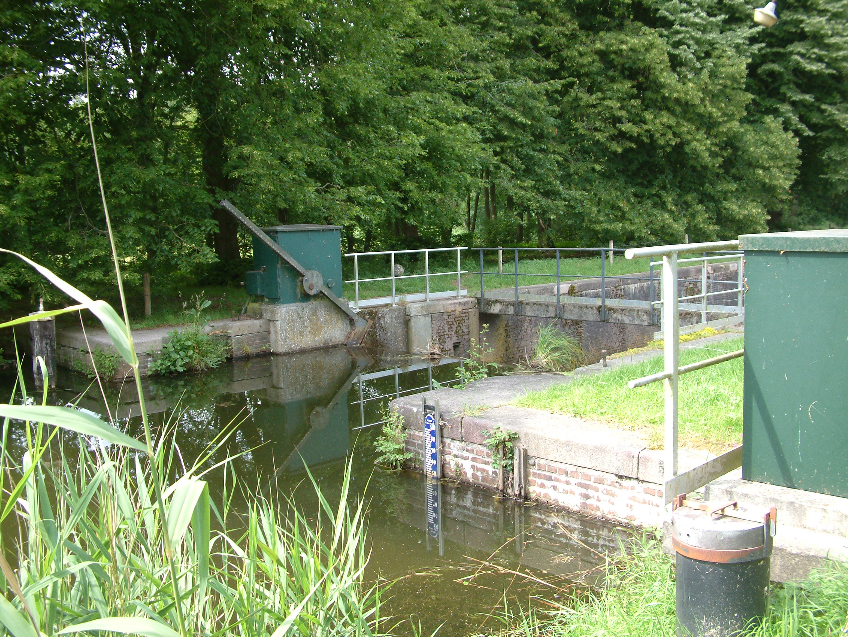 Sluis in het Apeldoorns kanaal van Dieren naar Hattem